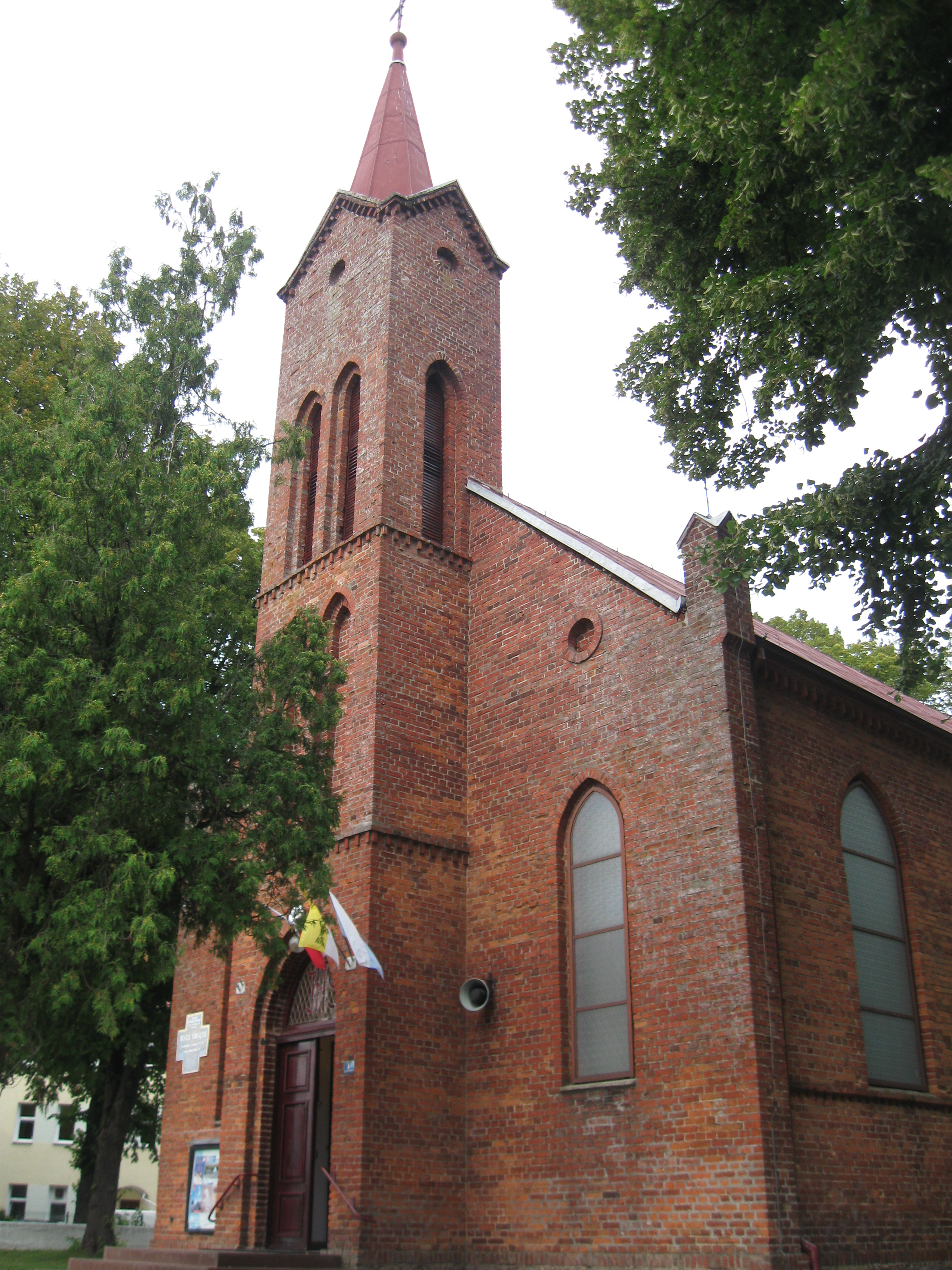 Siemyśl - rzymskokatolicki kościół parafialny pw. św. Stanisława Kostki